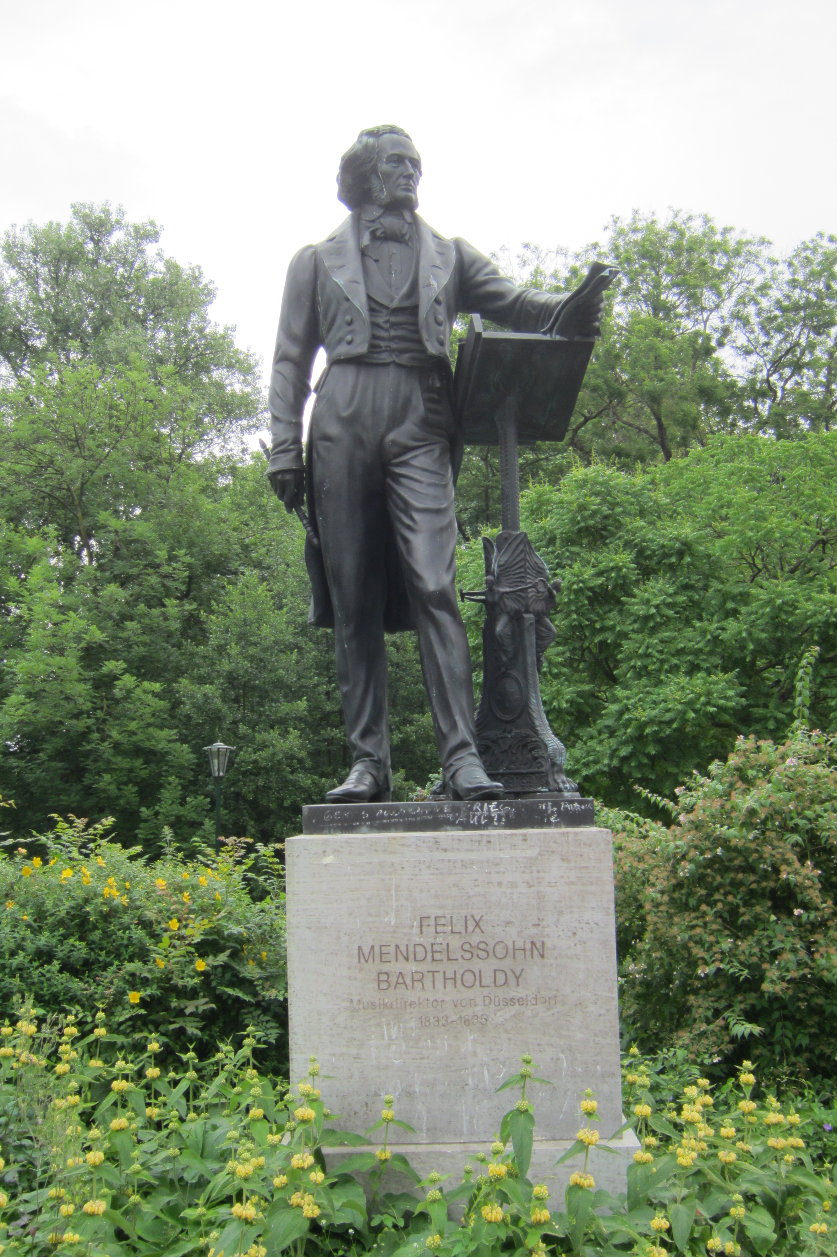 Felix Mendelssohn-Bartholdy, Düsseldorf, Duitsland